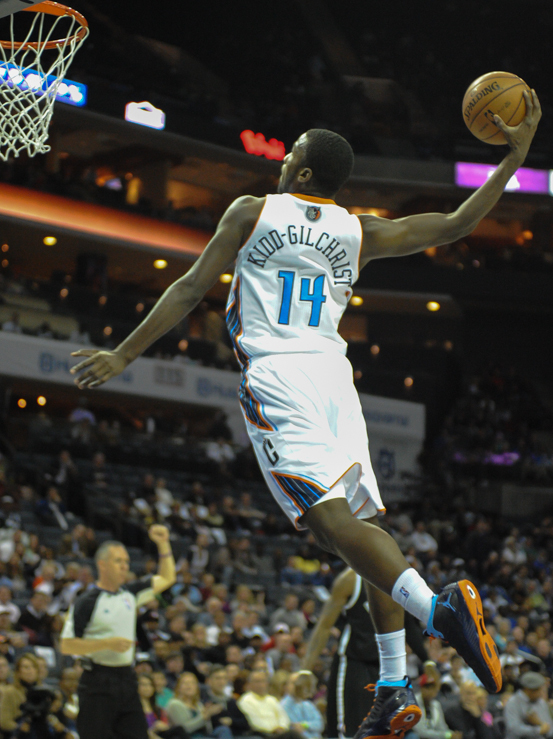 Michael Kidd-Gilchrist dunks